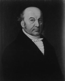 Gemälde in der Tübinger Professorengalerie